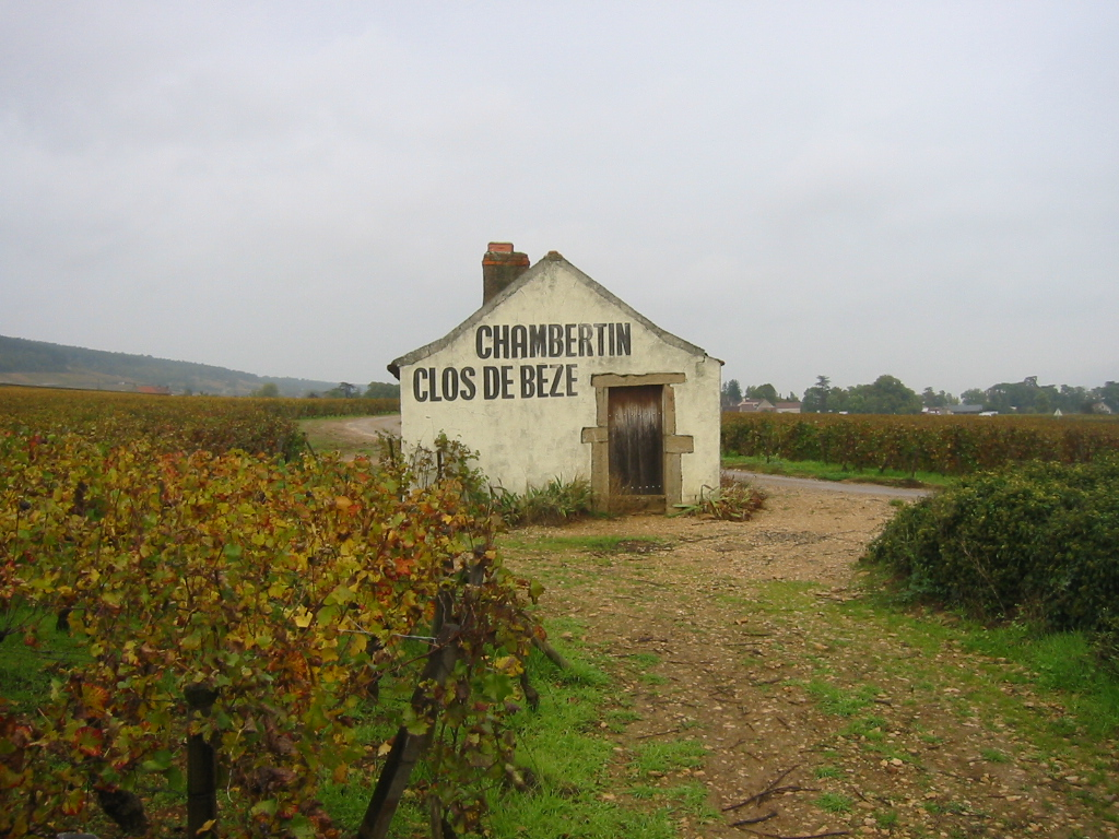 Vignoble du Clos de Beze 2. Appelation Gevrey Chambertin grand cru AOC des vins de Bourgogne